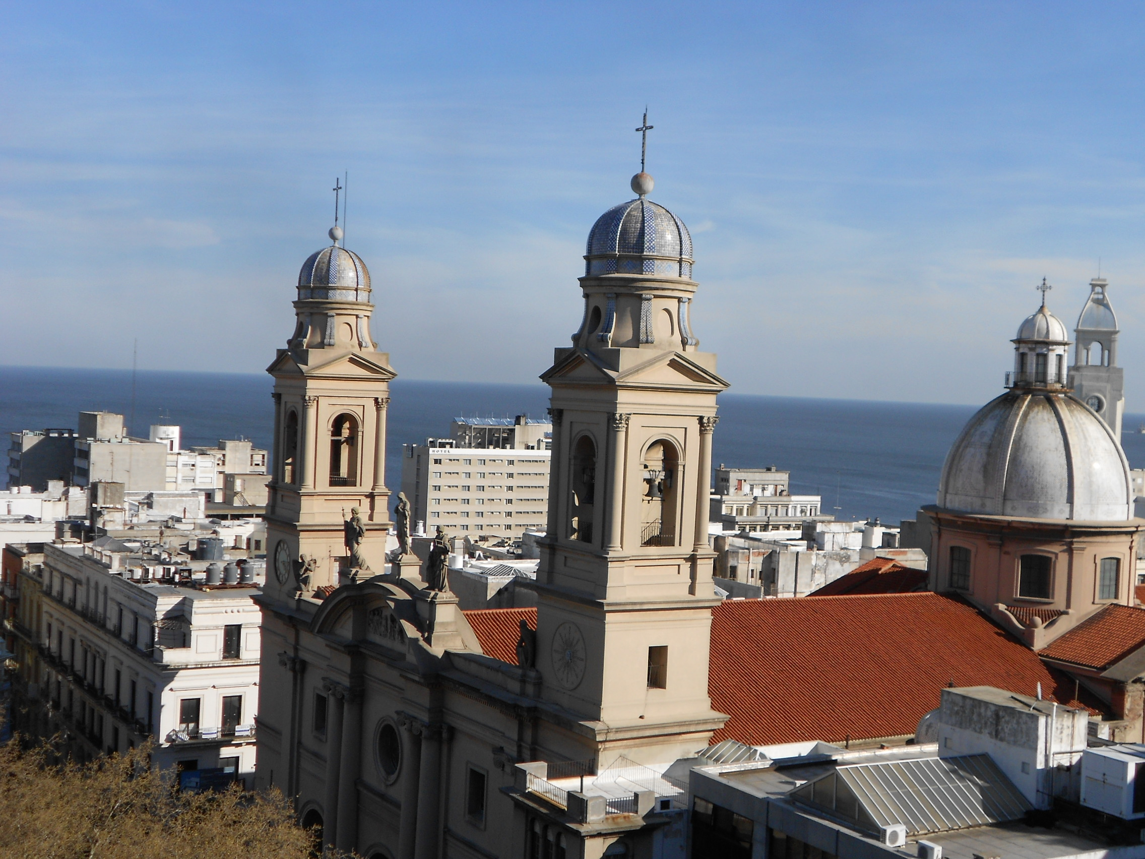 Catedral Metropolitana de Montevideo. Ubicada en el departamento de Montevideo